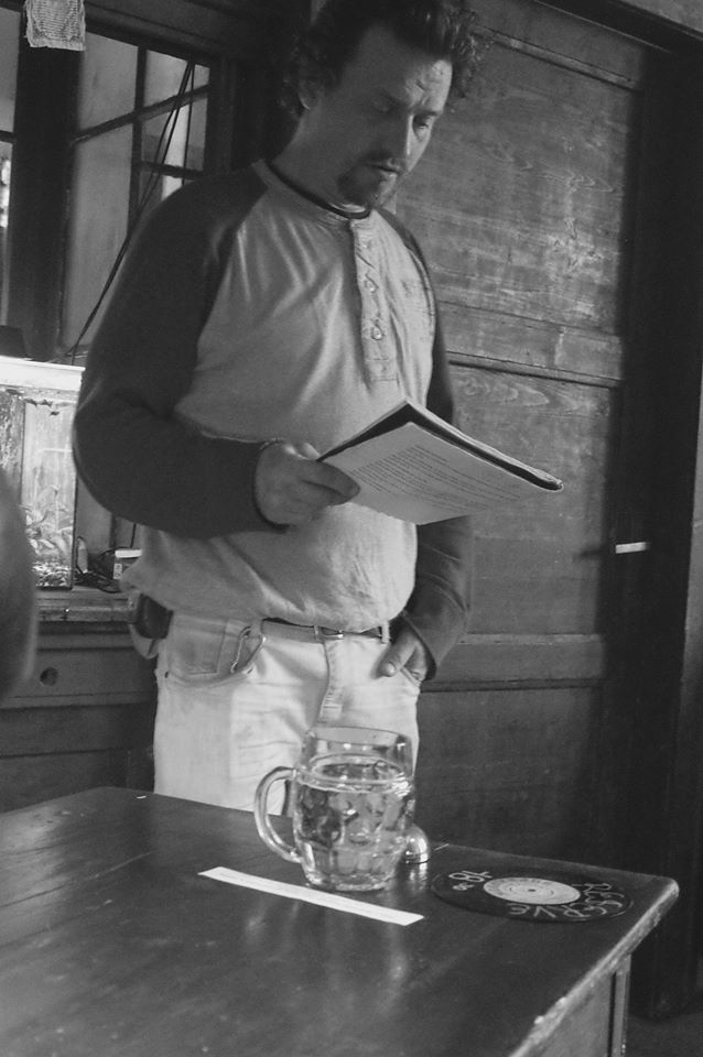 V Praze v literární kavárně Unijazz během autorského čtení ze sbírky Opálovým pobřežím.